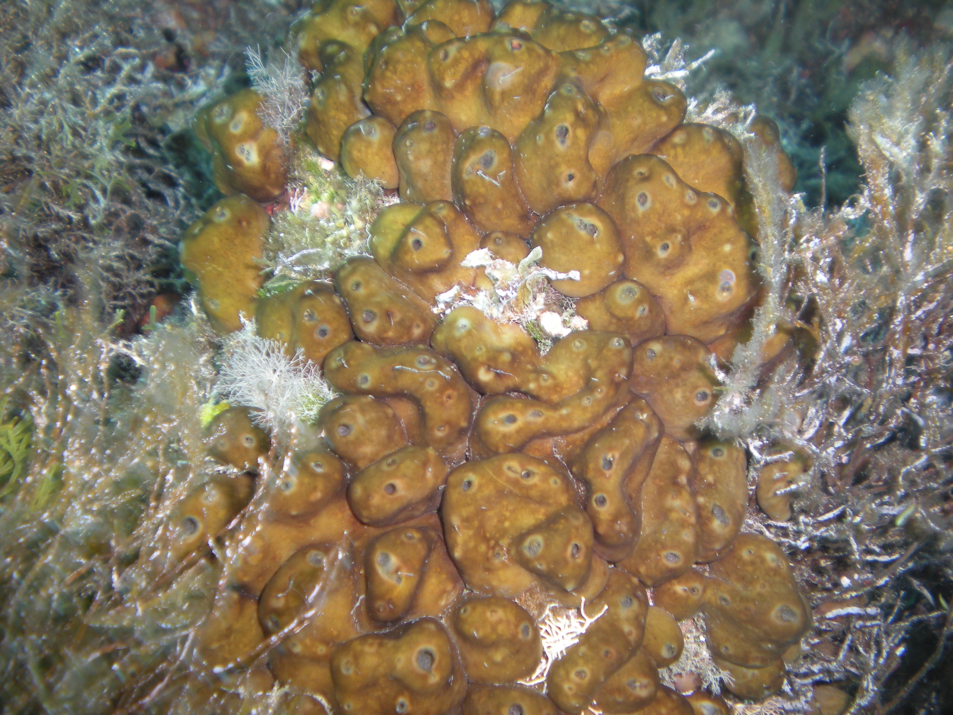 Chondrilla nucula (Demospongiae) AMP Capo Gallo, Sicily